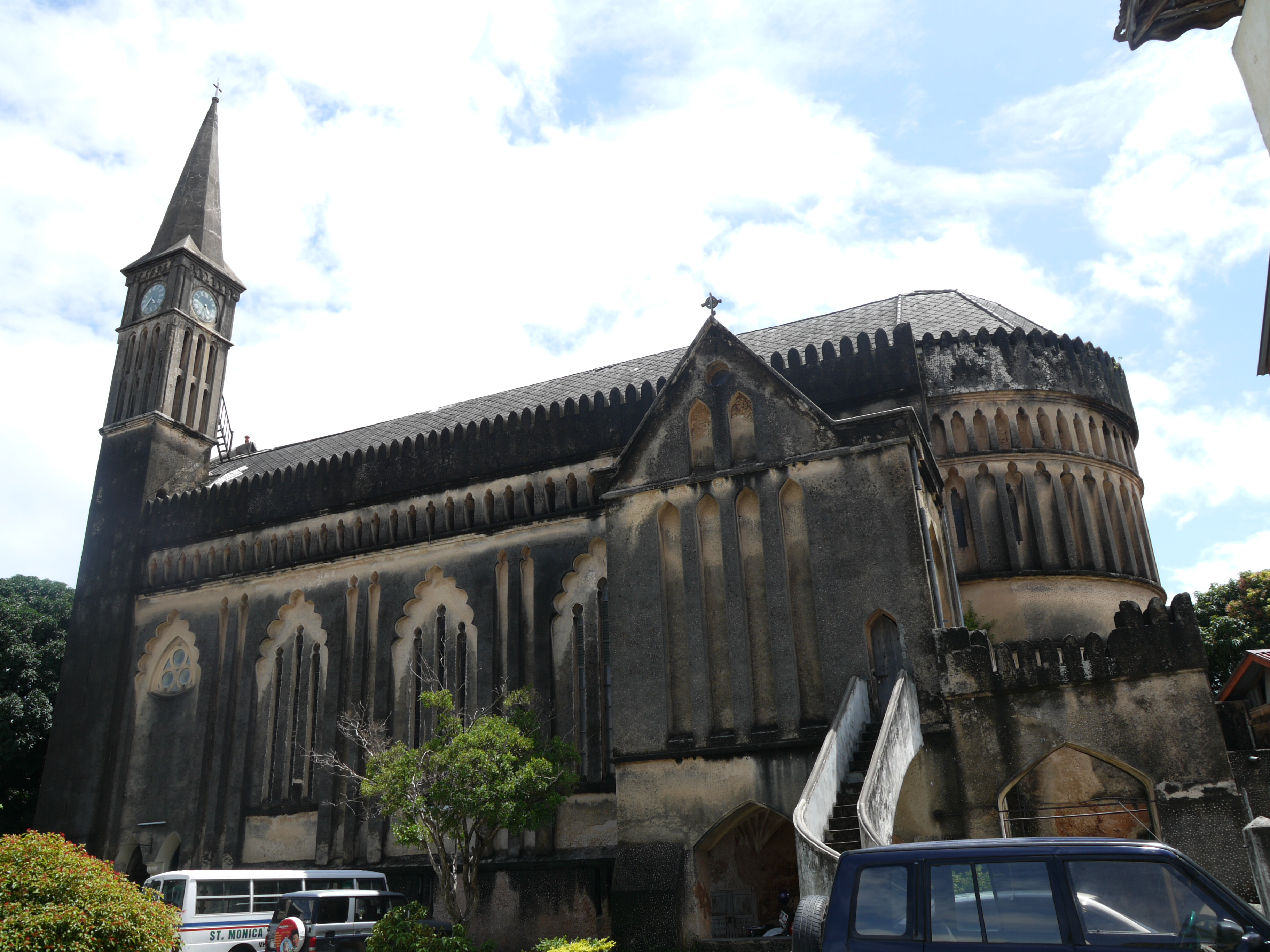 Anglikanische Kirche in Stonetown, Sansibar.